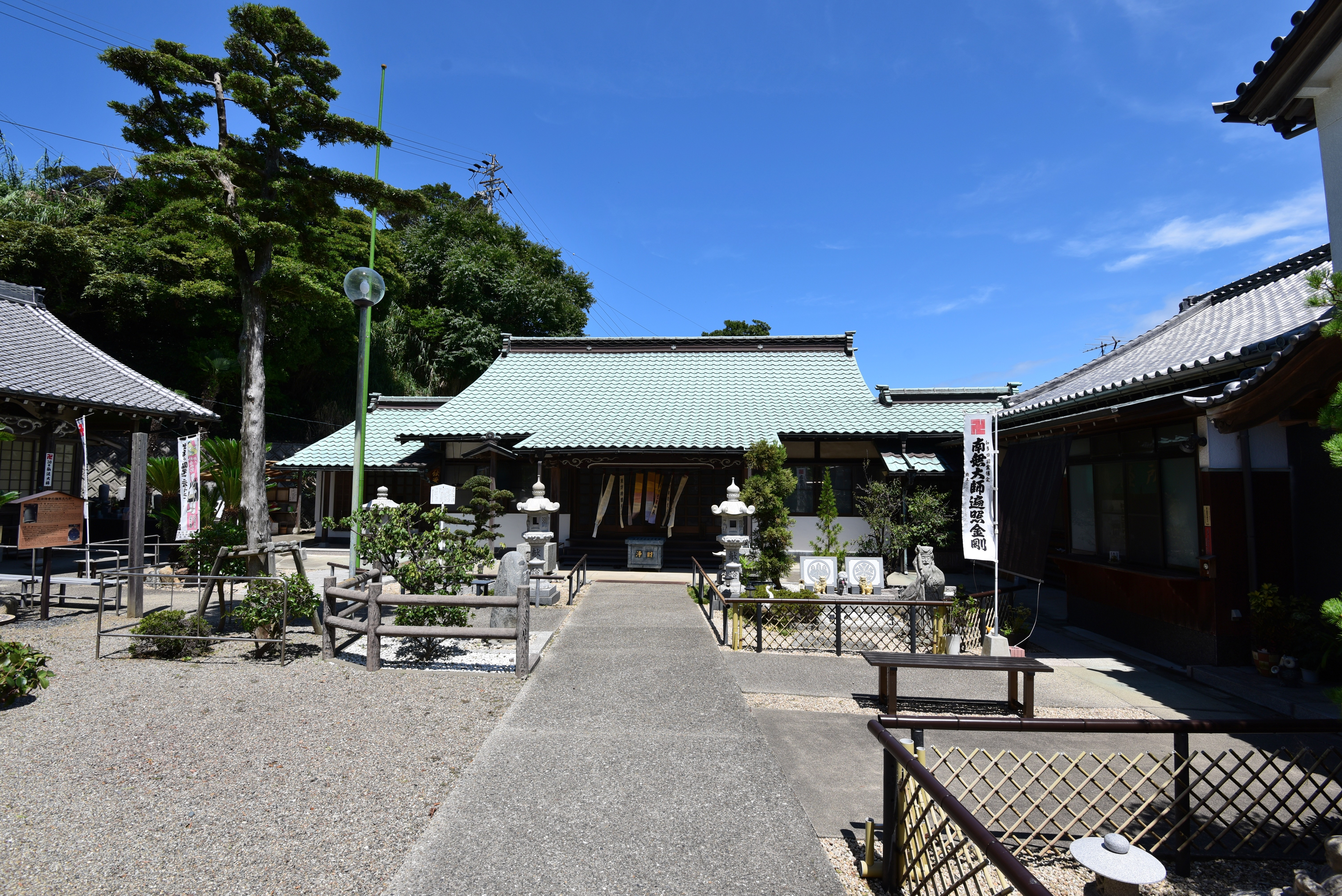 正法禅寺（本堂）